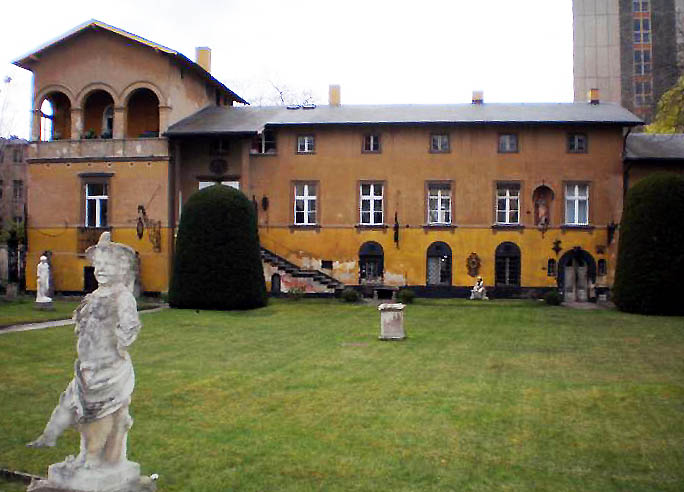 Die Villa Heydert in Potsdam. Von mir fotografiert am 6.4.07